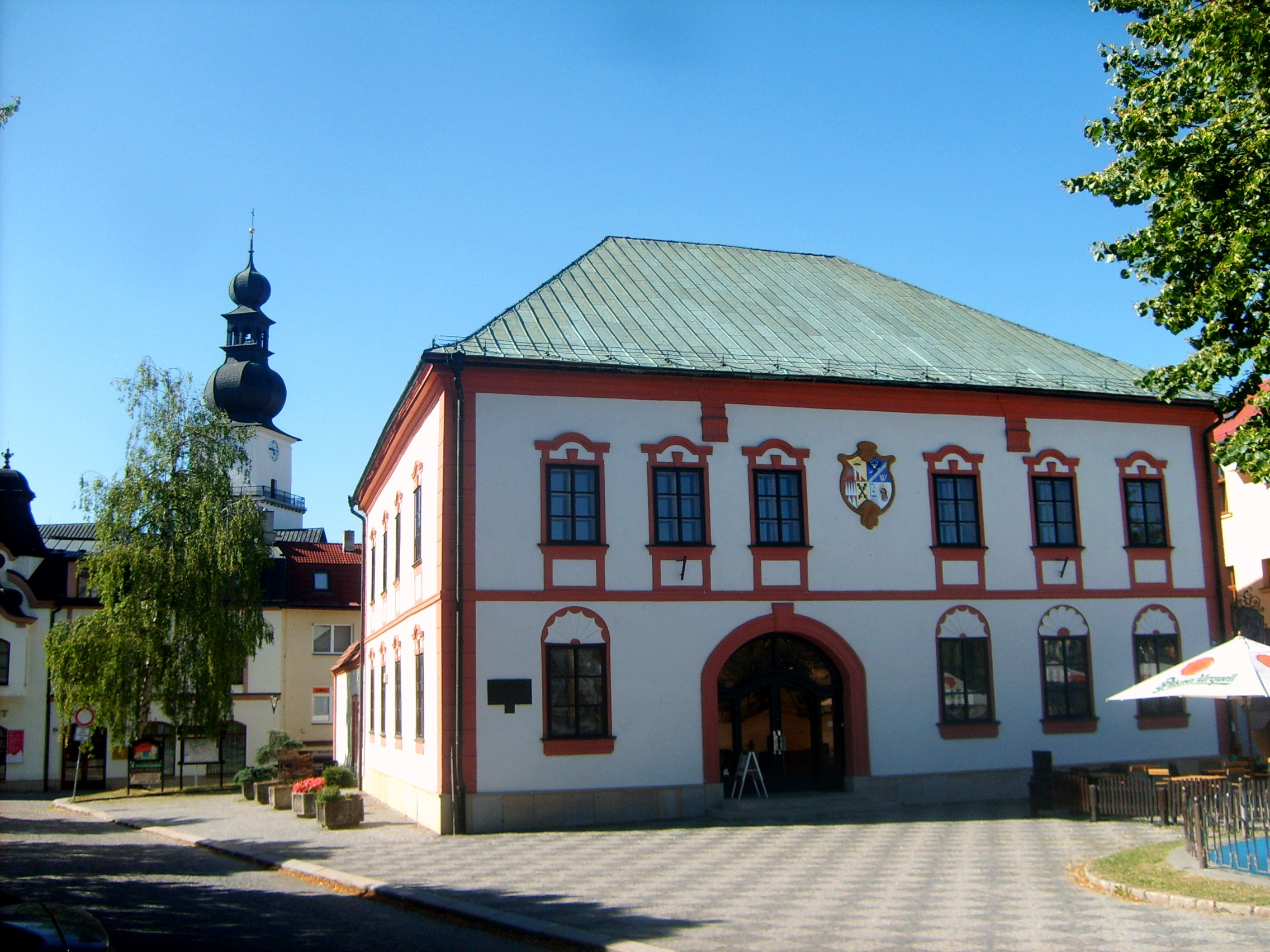 Budova staré radnice na nám. Republiky ve Žďáře nad Sázavou